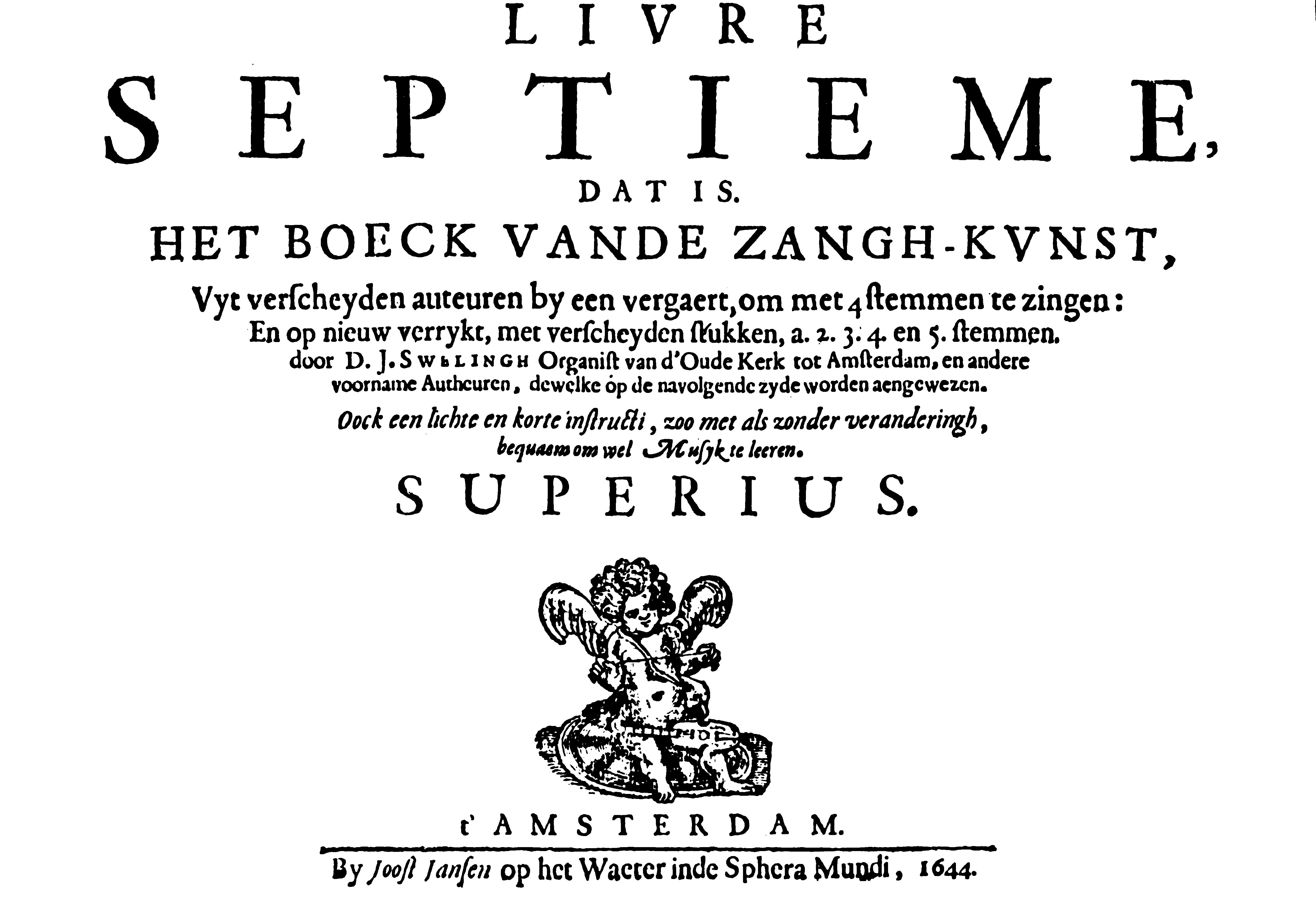 LIVRE SEPTIEME, DAT IS. HET BOECK VANDE ZANGH-KUNST, Vyt verscheyden auteuren by een vergaert, om met 4 stemmen te zingen: En op nieuw verrykt, met verscheyden stukken, a. 2. 3. 4. en 5. stemmen. door D.J.SWELINGH Organist van d'Oude Kerk tot Amsterdam, en andere voorname Autheuren, dewelke op de navolgende zyde worden aengewezen. Oock een lichte en korte instructi, zoo met als zonder veranderingh, bequaem om wel Musyk te leeren. SUPERIUS. t' AMSTERDAM. By Joost Jansen op het Waeter inde Sphera Mundi, 1644.